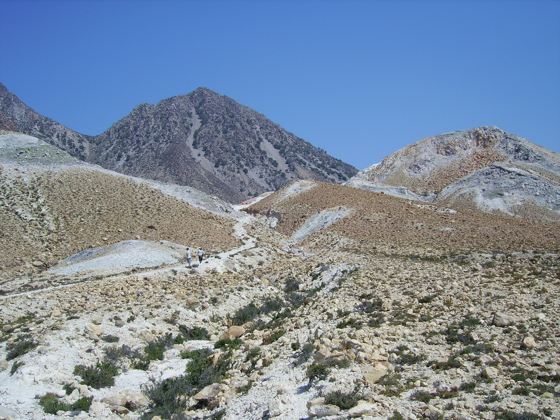 Nisyr03.JPG